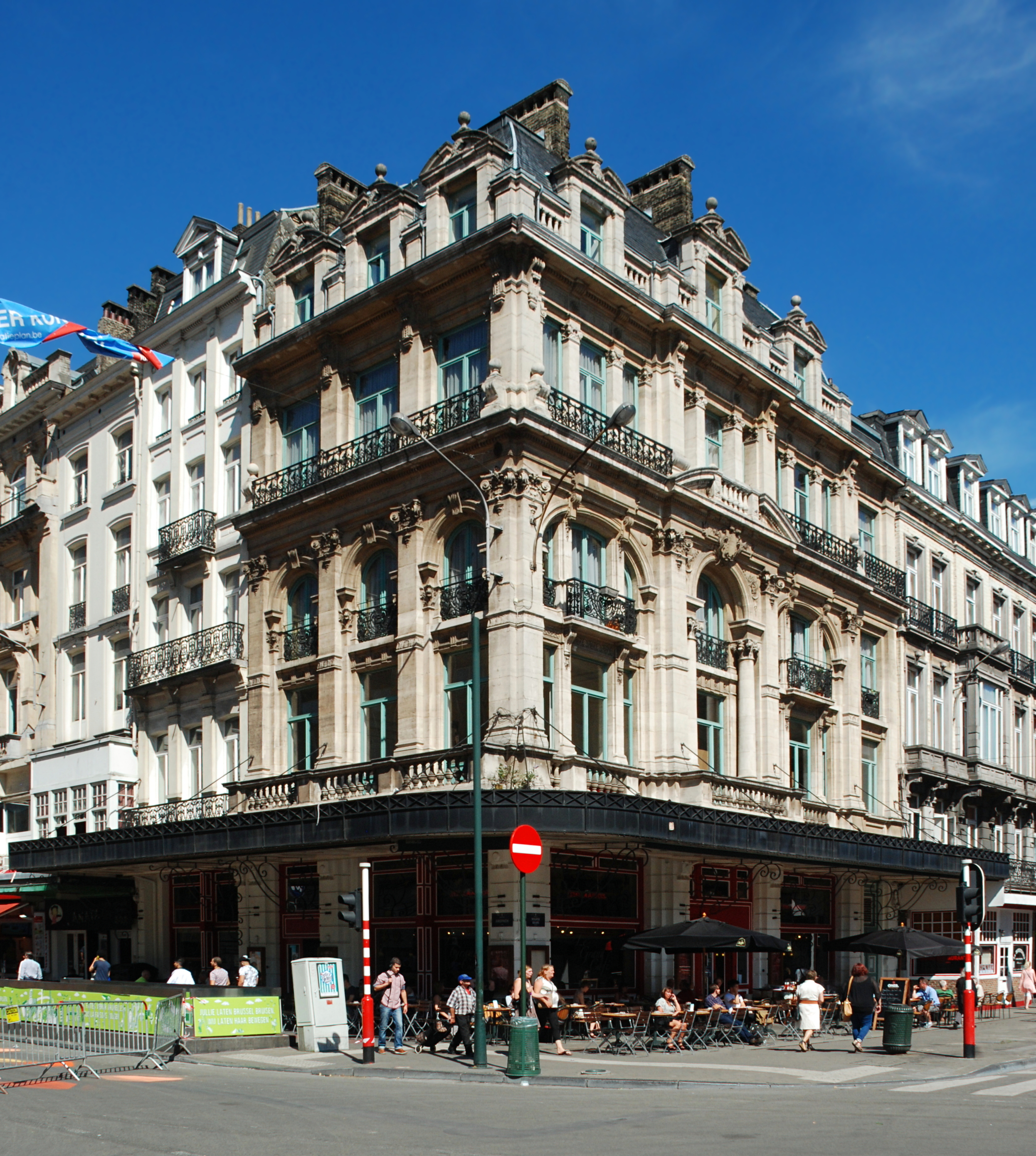 Belgique - Bruxelles - Café de la Bourse (style éclectique, architecte Émile Janlet, 1874)